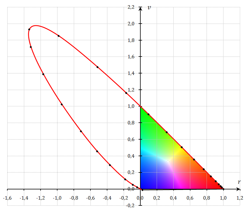 Diagramme de chromaticité pour le système CIE RVB